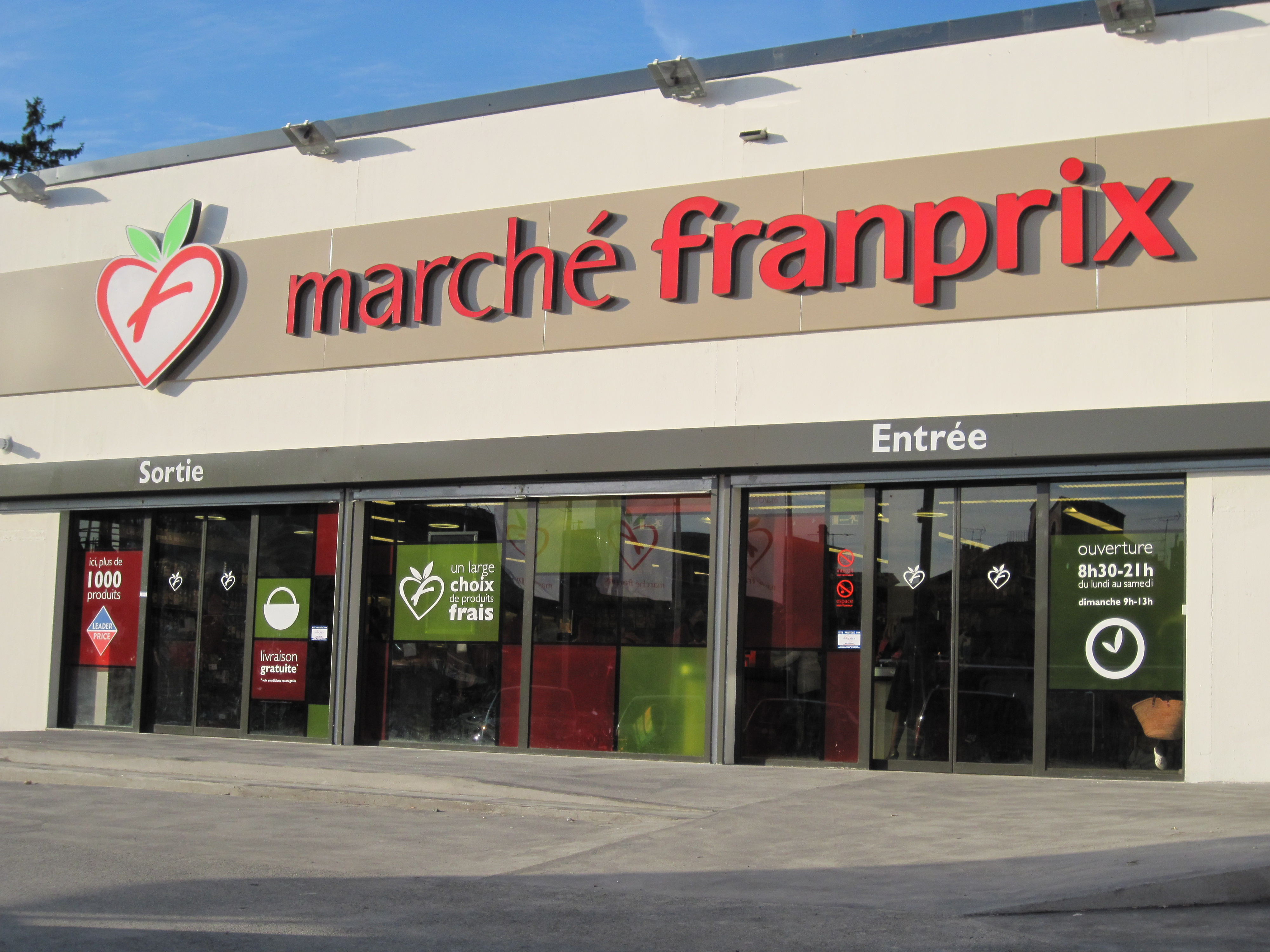 Devanture d'un magasin Franprix